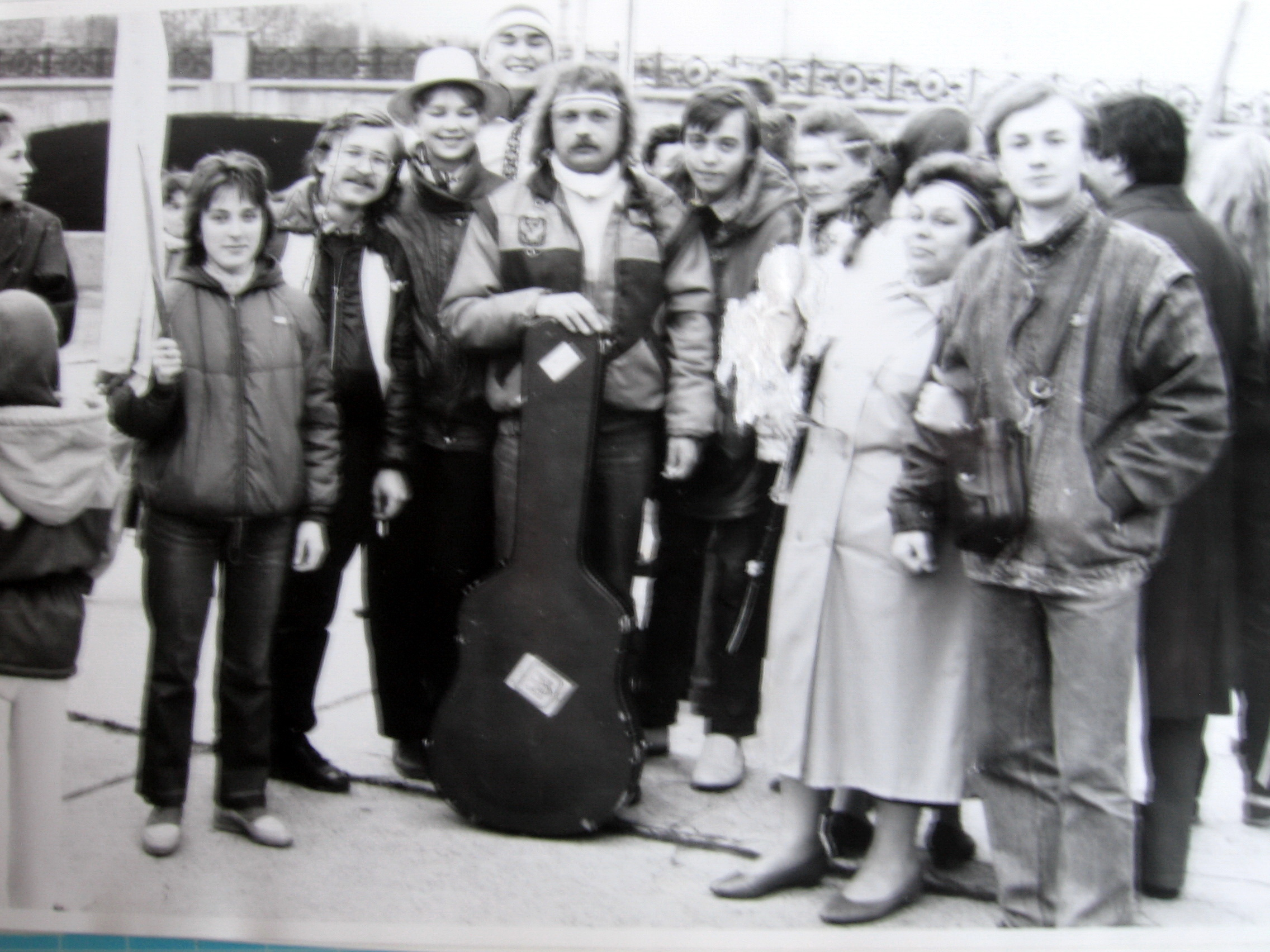 Беларуская (тарашкевіца): Талака разам з Сяржуком Сокалаў-Воюшам, Парк Горкага, 1990.